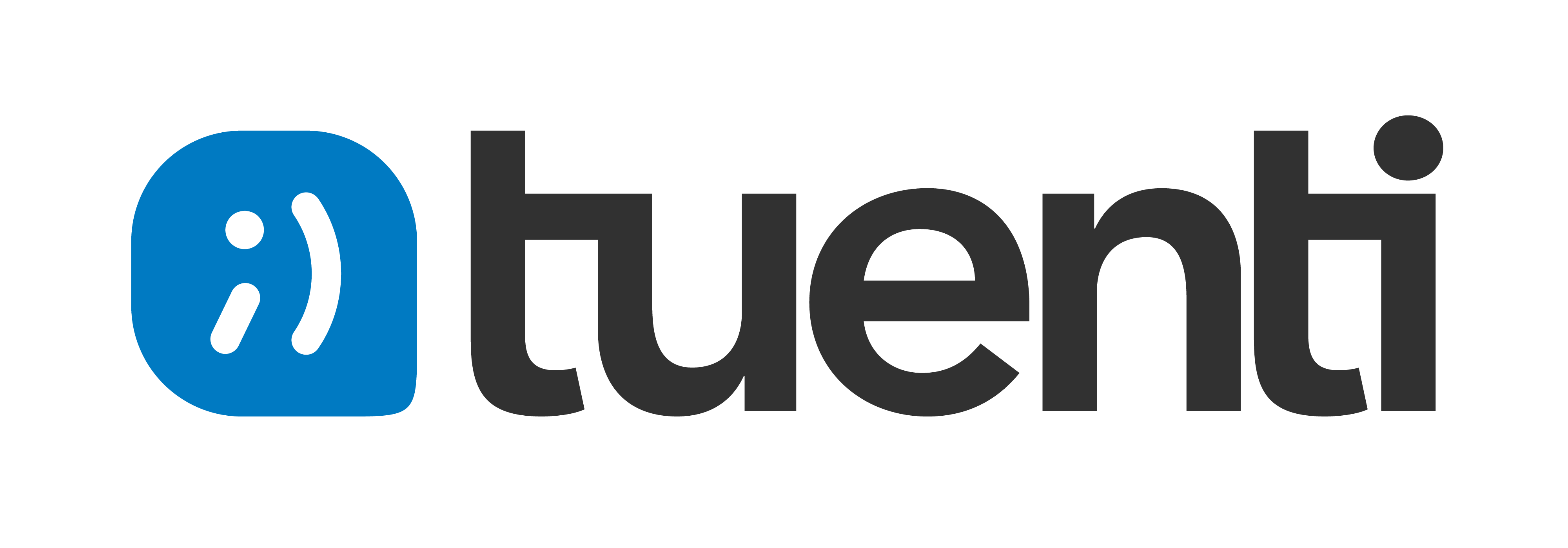 Nuevo logo de Tuenti, en uso desde 2012. Aún falta su aplicación a la web.